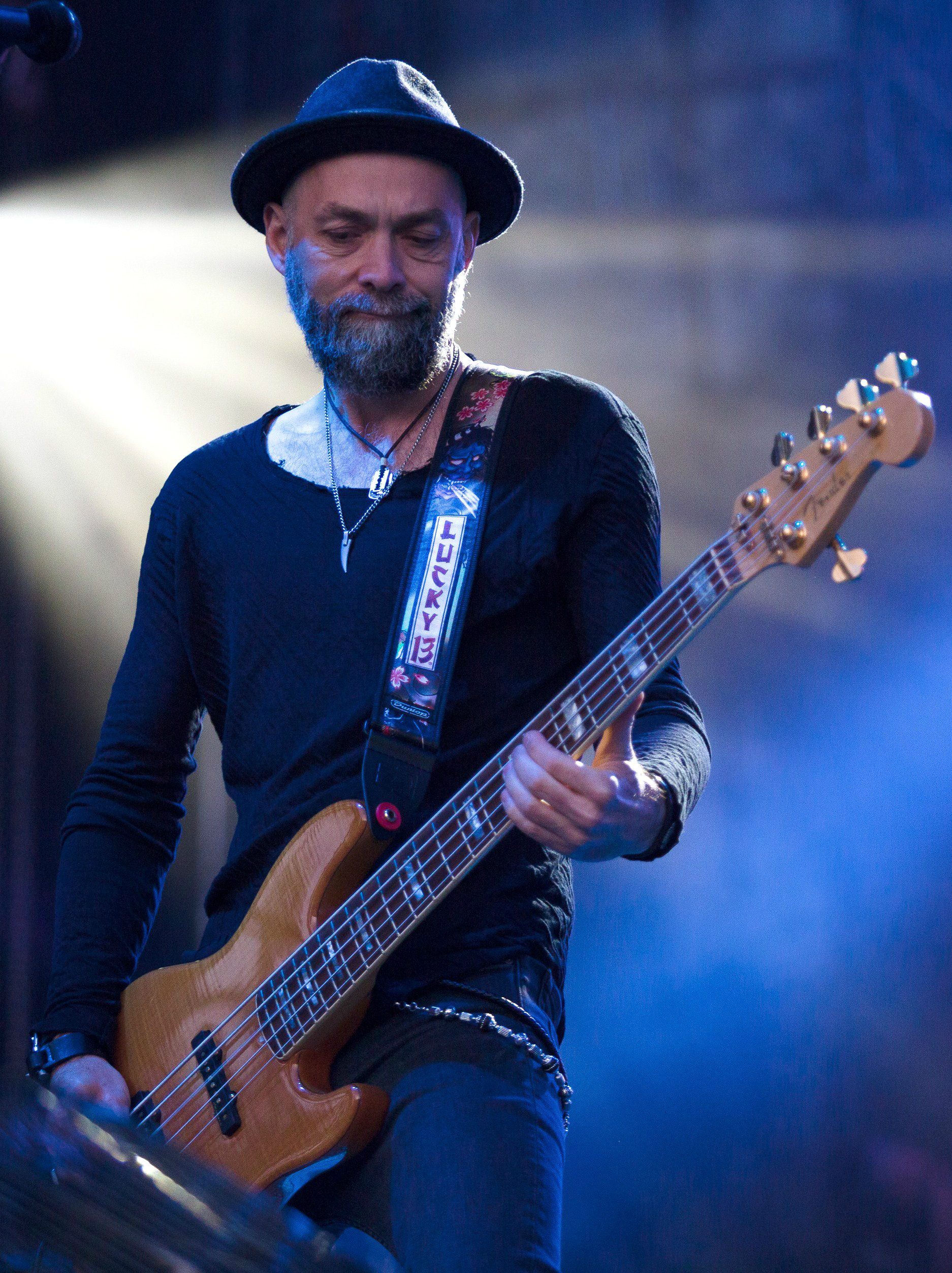 Krzysztof Kieliszkiewicz, koncert Lady Pank podczas Juwenaliów Politechniki Warszawskiej w 2017.